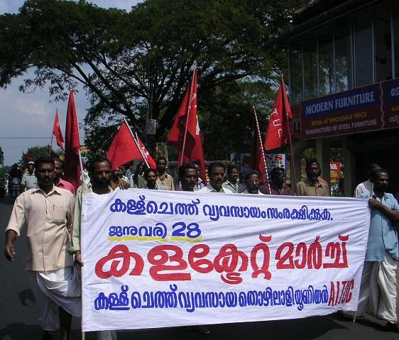 AITUCs toddyarbetarfack demonstrerar i Alappuzha, Kerala sv:2004. Foto: Soman